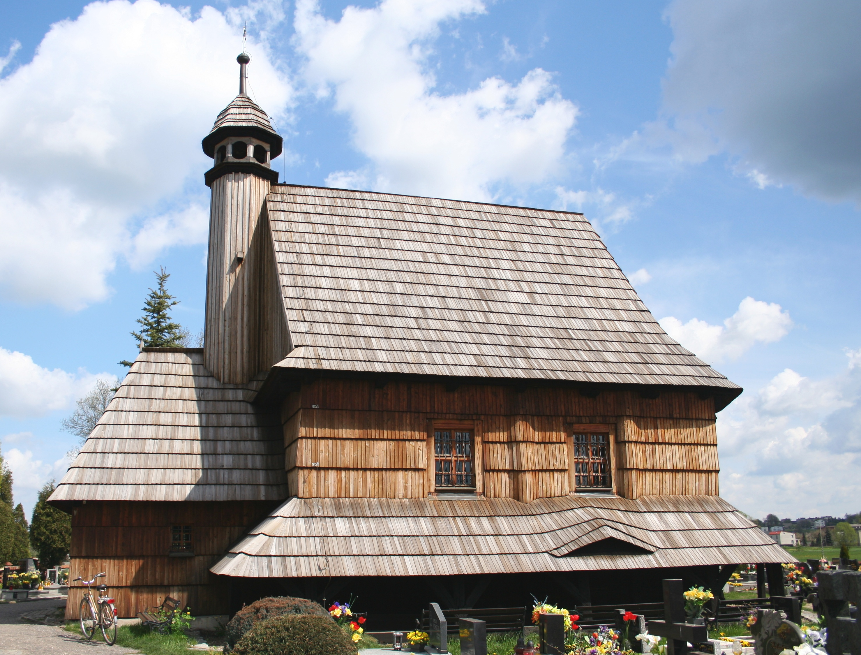 Zabytkowy kościół św. Walentego w Woźnikach, Polska, województwo śląskie